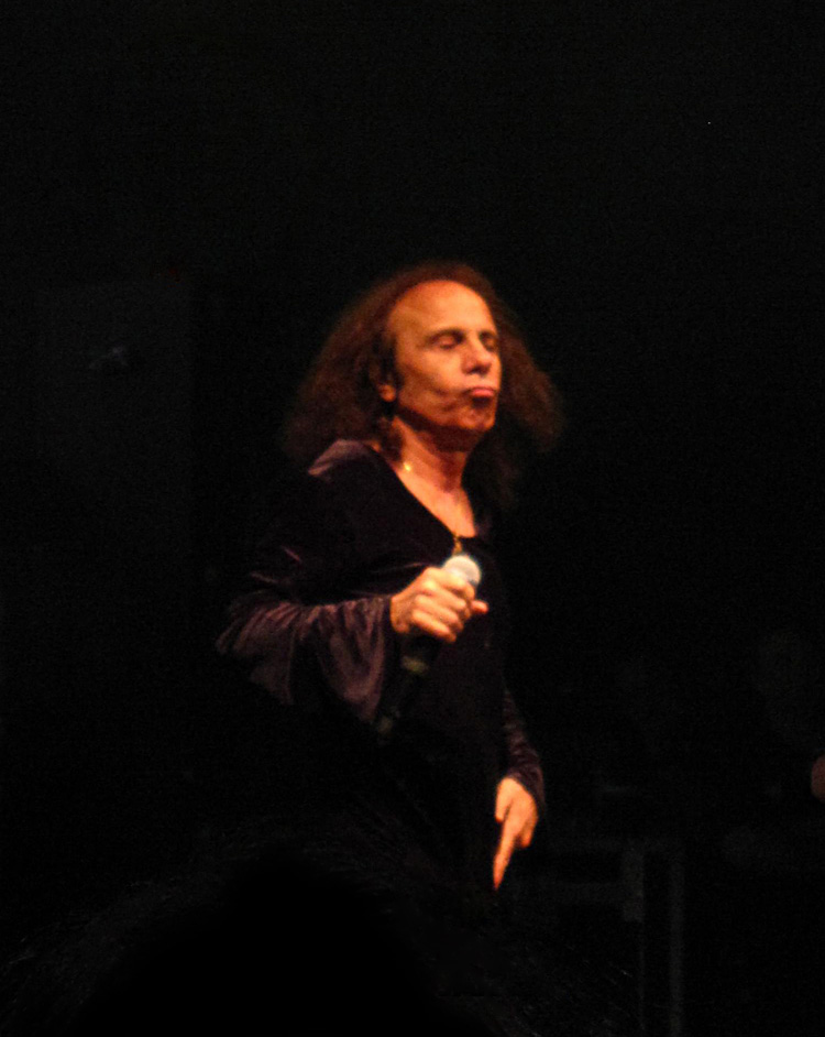 Ронни Джеймс Дио в группе Heaven & Hell